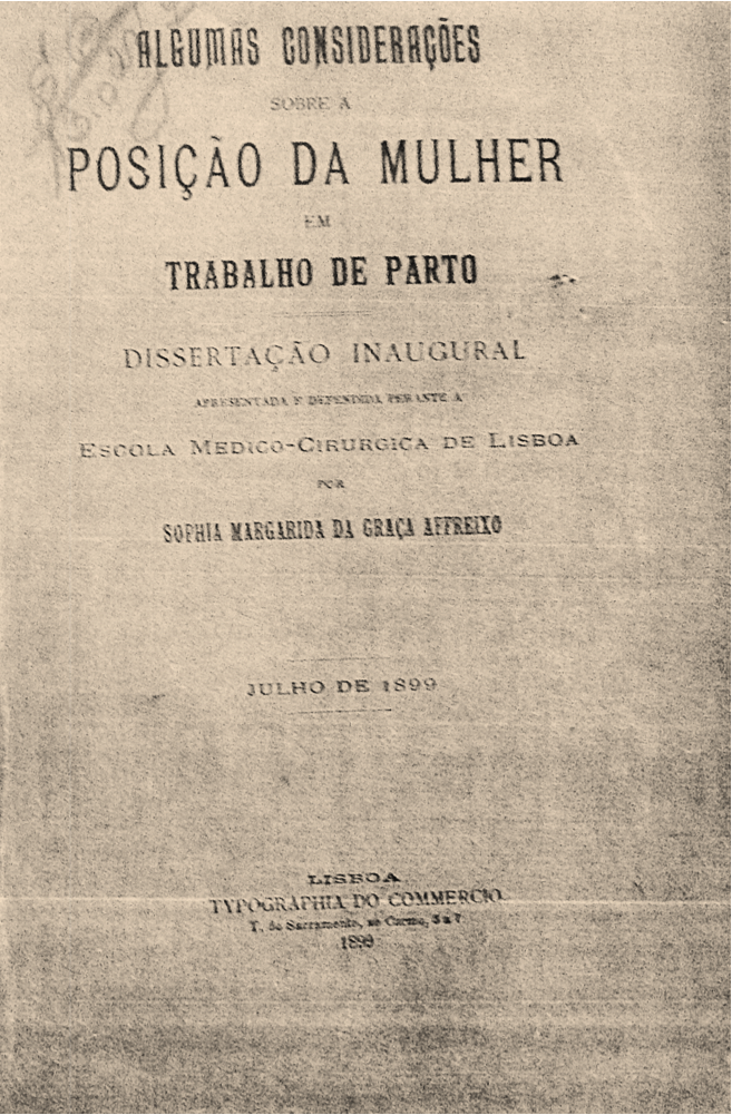 Assinatura Sofia Margarida Graça Afreixo - Documentos do projecto mapeamento de mulheres cientistas - AMONET - CIG - coord. Isabel Lousada e Vasco Bonifácio. Tratamento de imagem Vasco Bonifácio